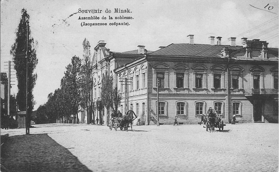 Беларуская (тарашкевіца): Менск (Miensk), Новае Места (Novaje Miesta): вуліца Падгорная (vulica Padhornaja) каля скрыжаваньня з Дамініканскай (vulica Daminikanskaja). Шляхецкі клюб